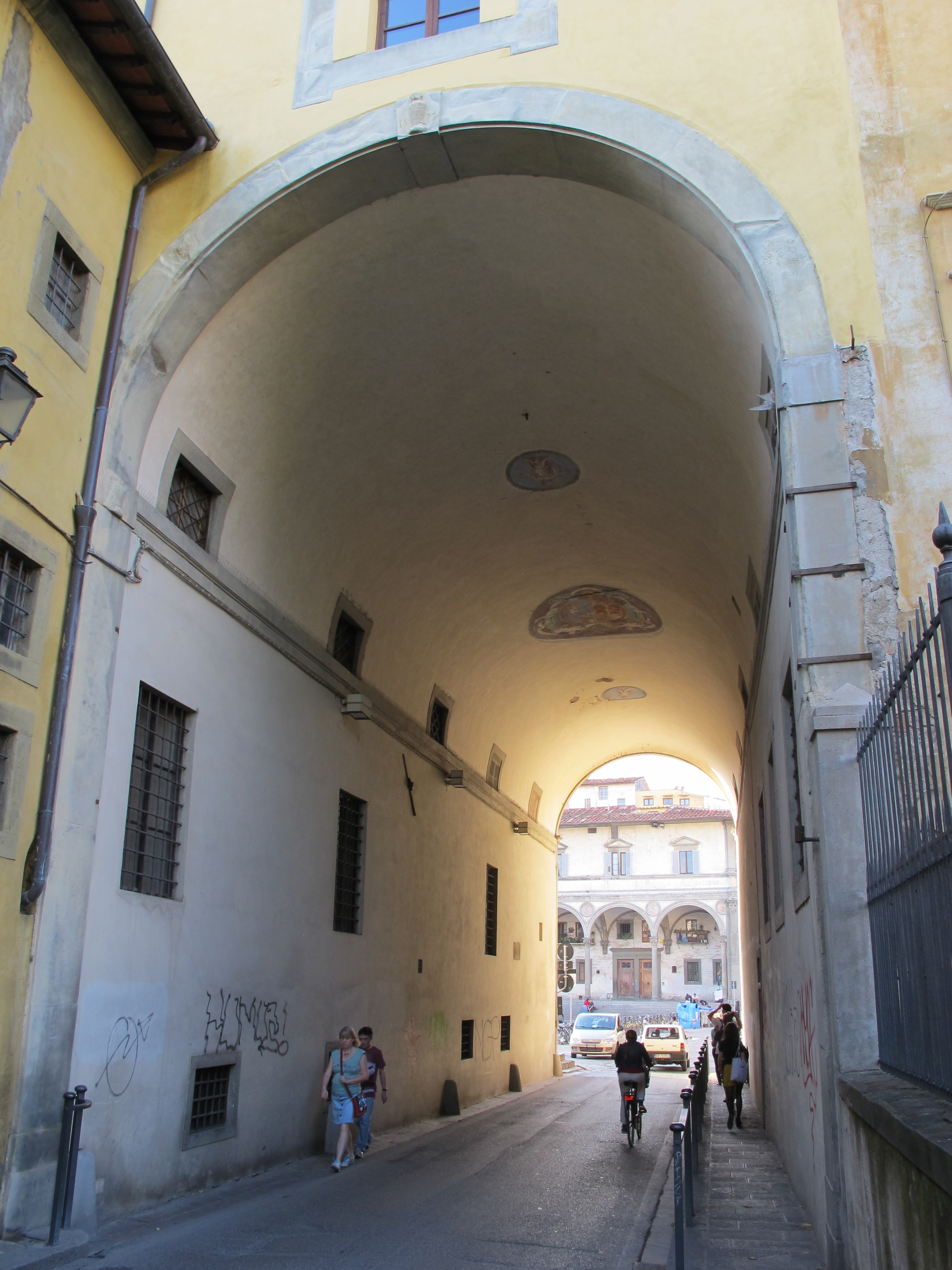 Via della Colonna, Firenze